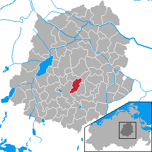 Kriesow, Landkreis Demmin, Mecklenburg-Vorpommern